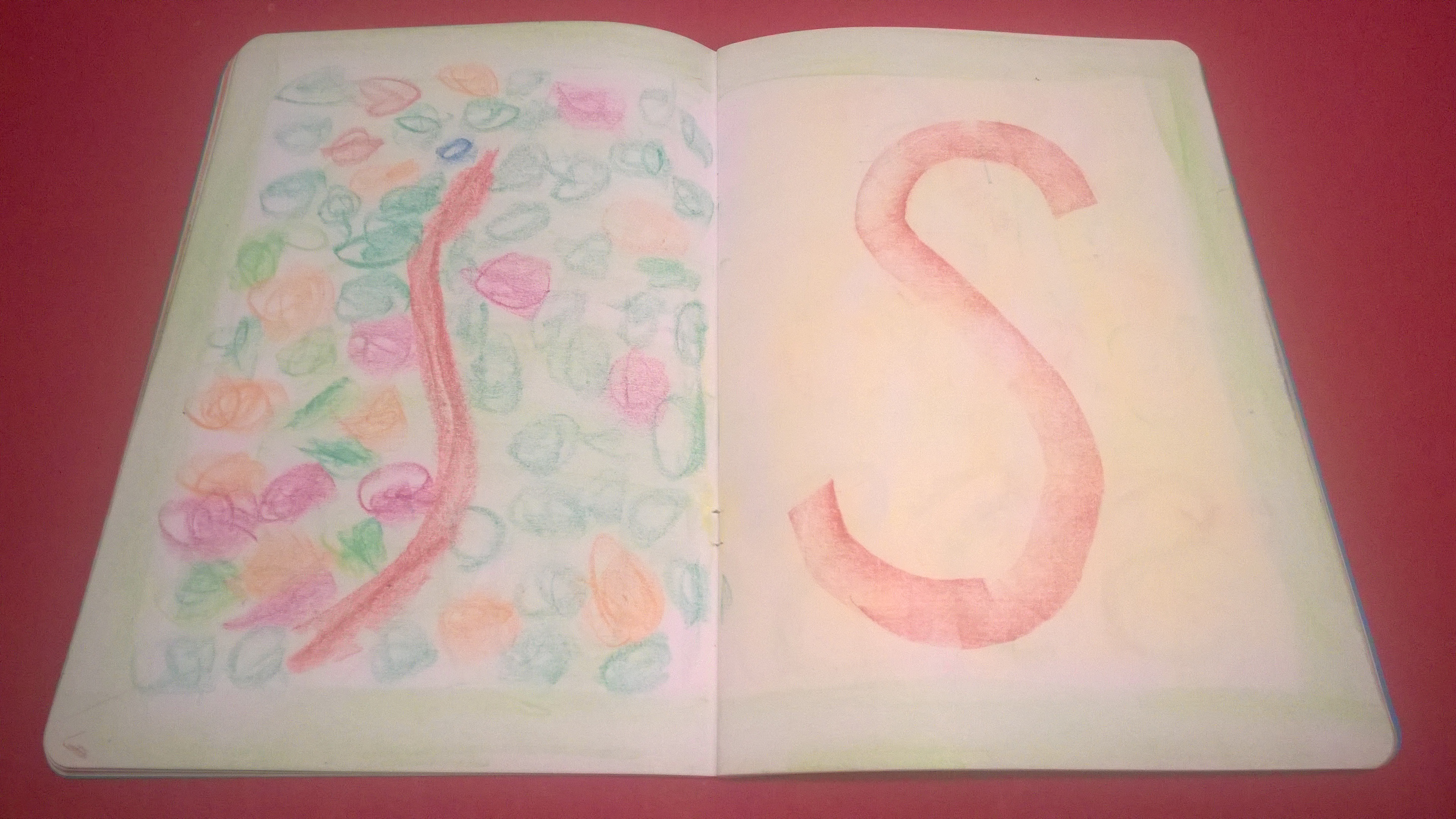 Zavedení písmene S - waldorská škola - 1. třída - epochový sešit část 1